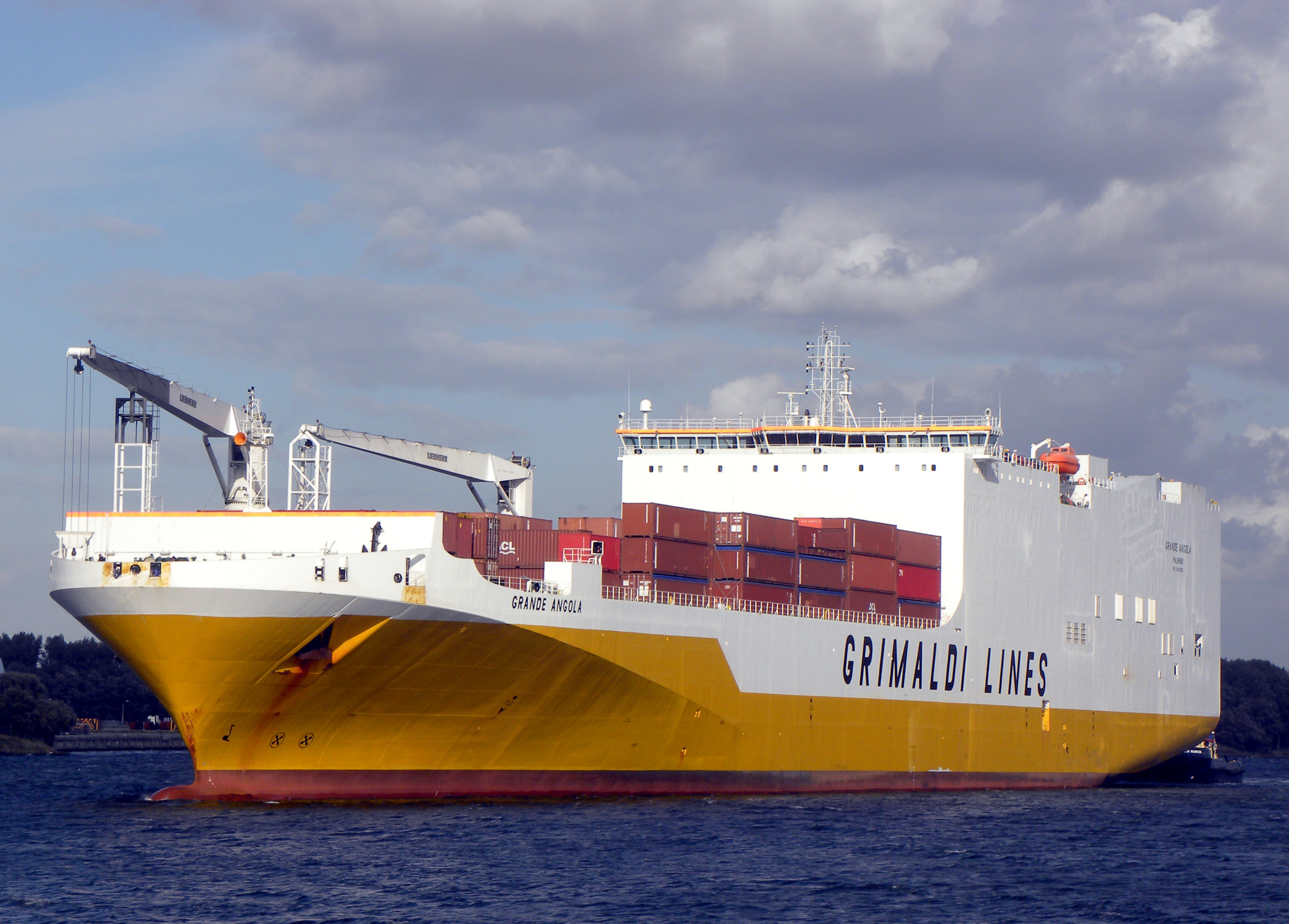 Grande Angola - IMO 9343156 build 2008 flag Italy